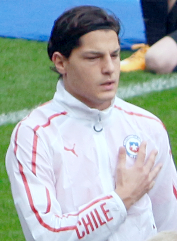 Miiko Albornoz cantando el himno nacional de Chile en el partido amistoso de Chile ante Brasil, del día 29 de marzo de 2015.